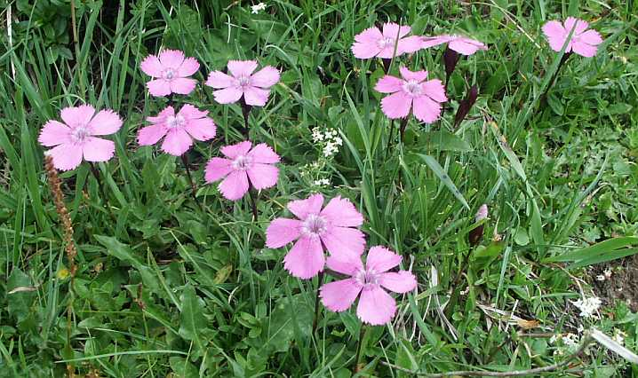 Alpen-Nelke (Dianthus alpinus), Fundort: Nähe Liezener Hütte, Wörschach, Österreich